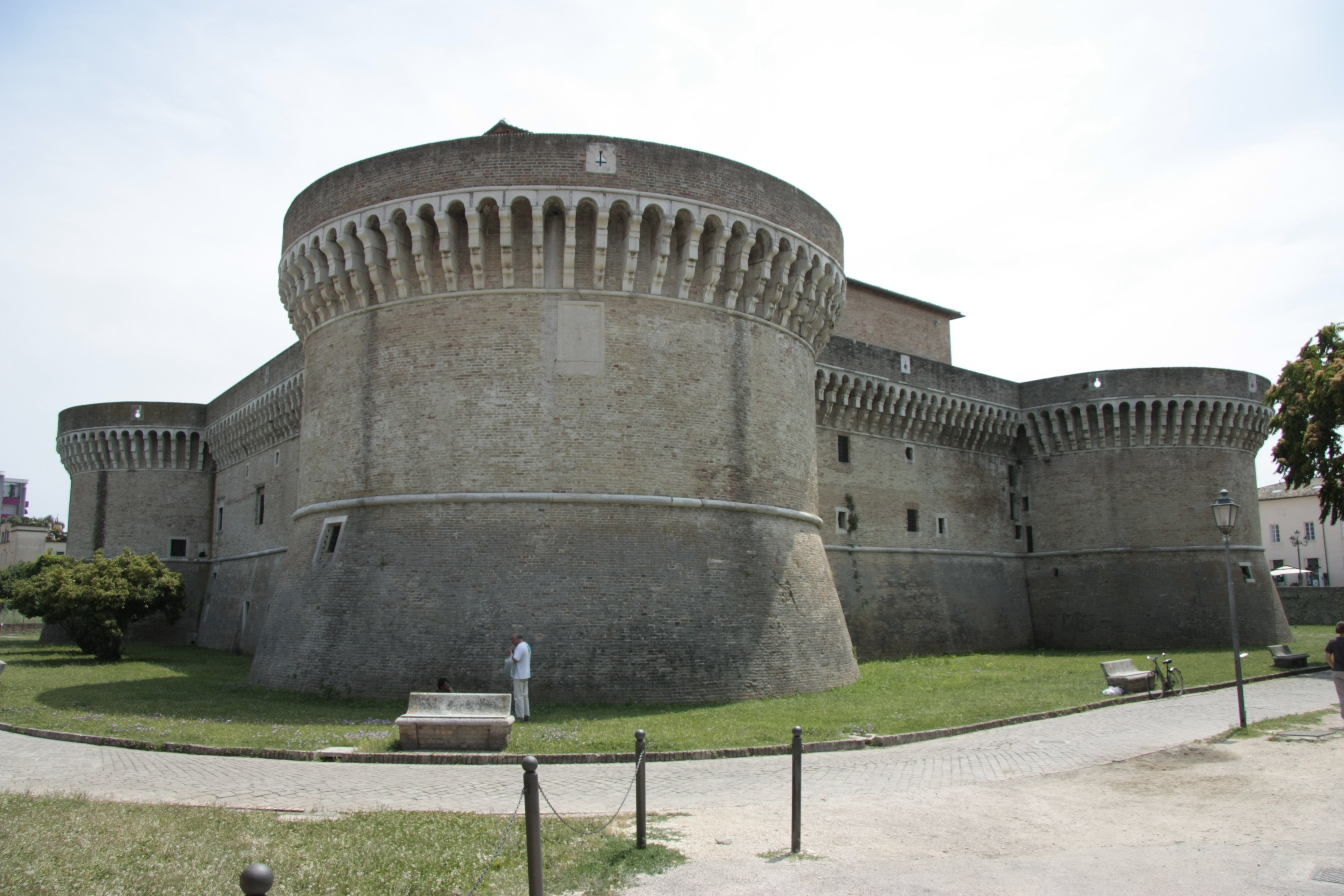 Senigallia - Rocca Roveresca Rückseite